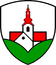 Wappen von Lenart Slowenien